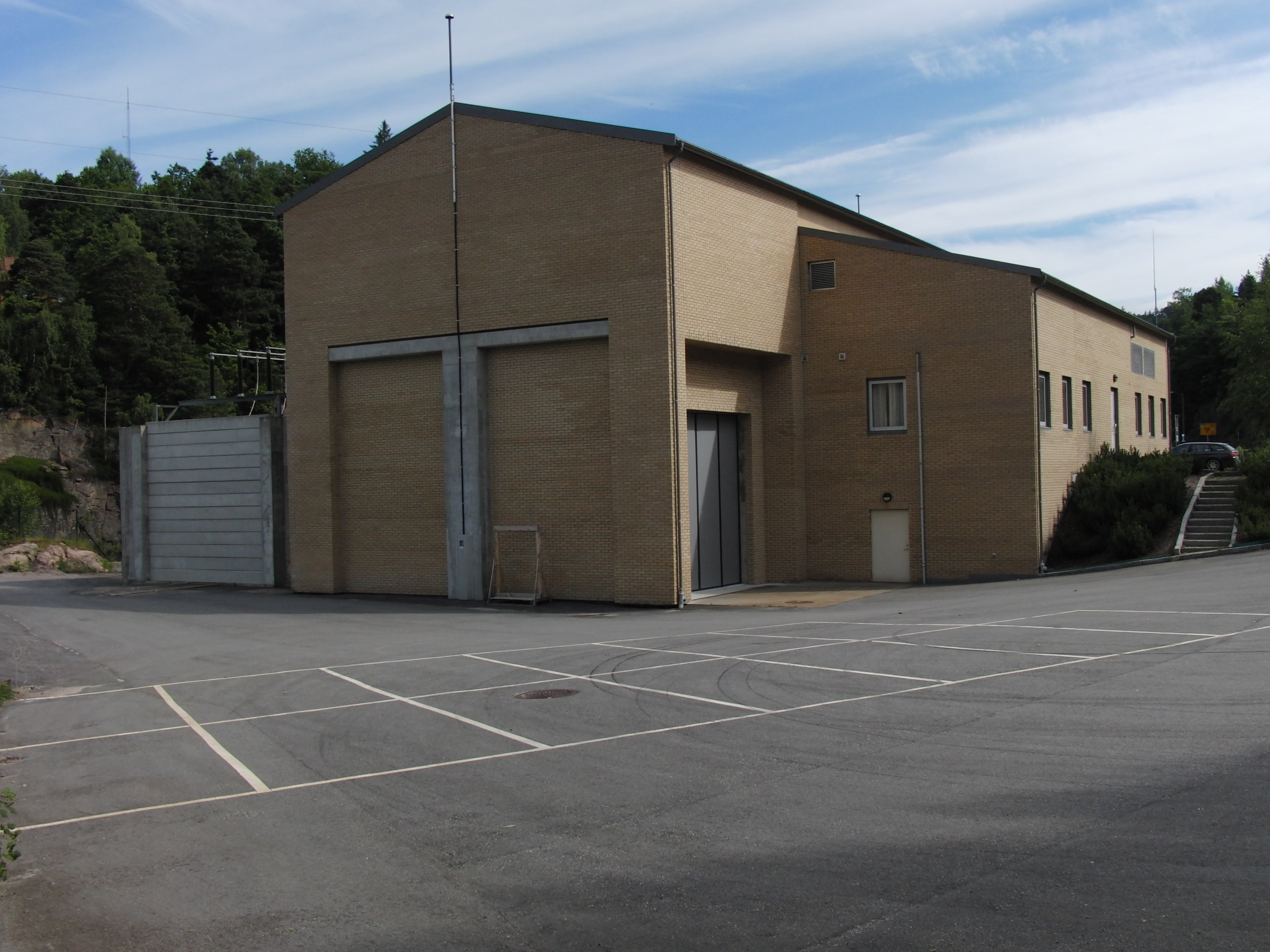 Hunsfoss nye kraftverk